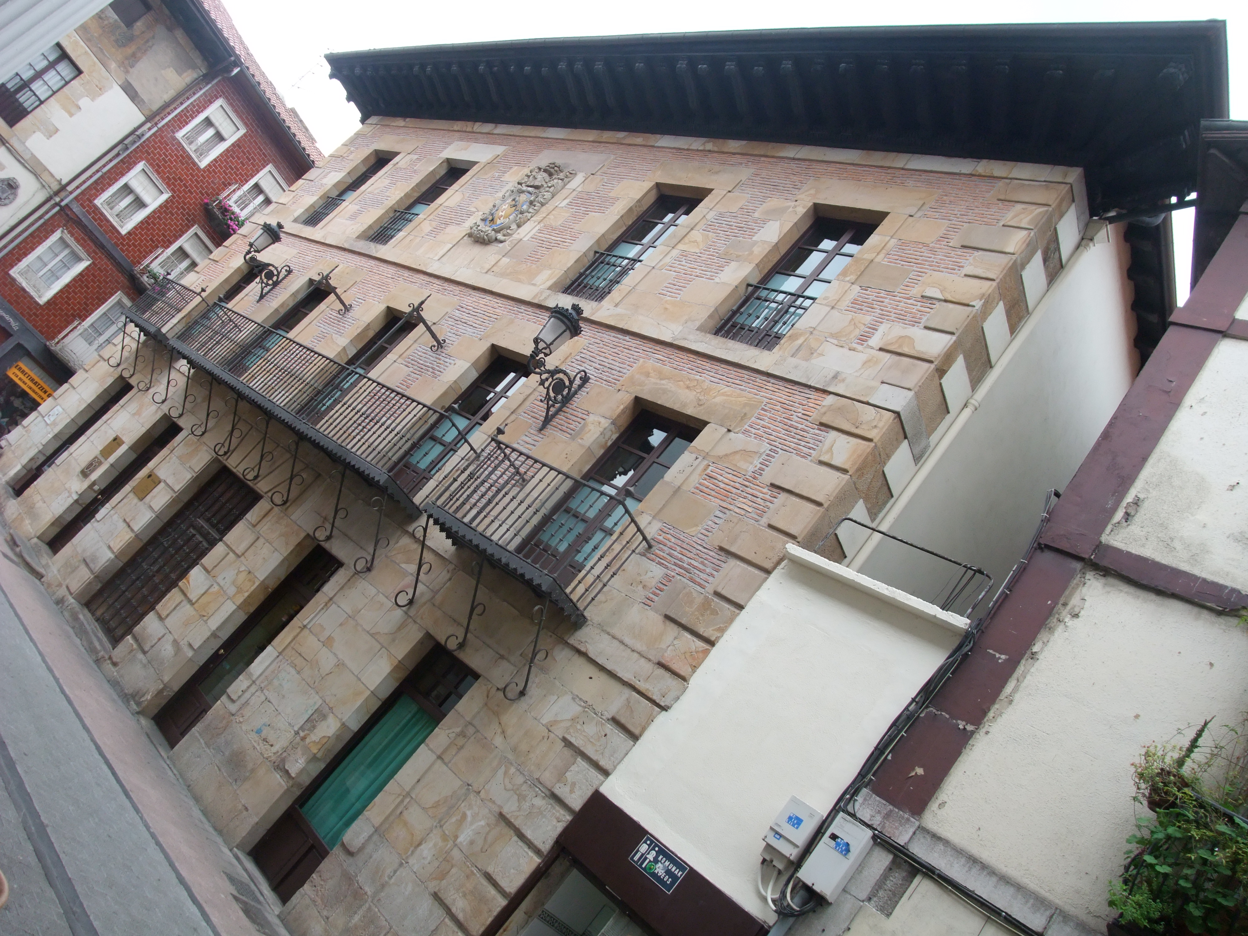 Ordizia (Guipúzcoa)-Casa Abaria-1